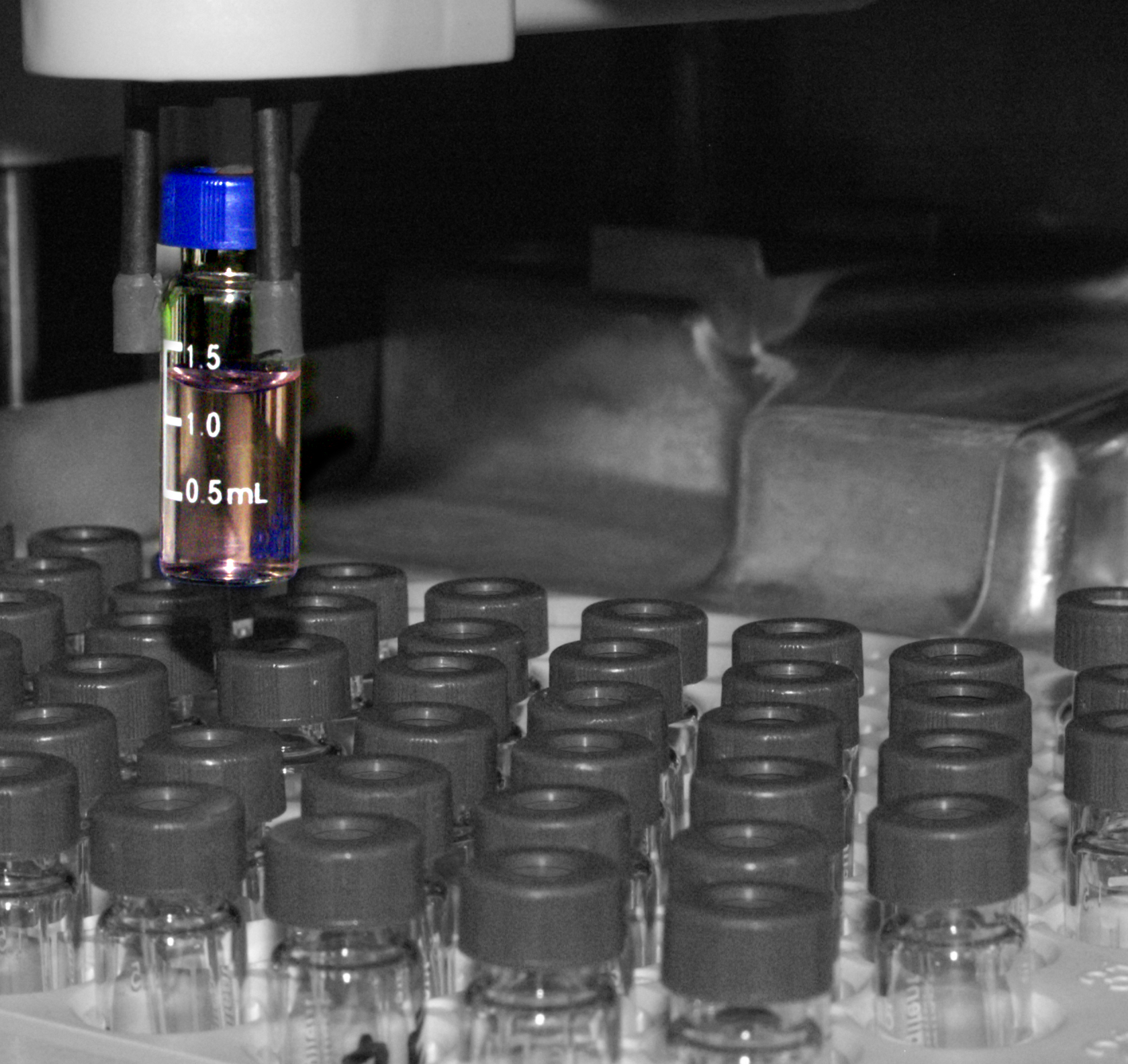 Autosample takes a Vial.